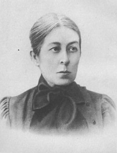 Vera Figner (1852-1942)